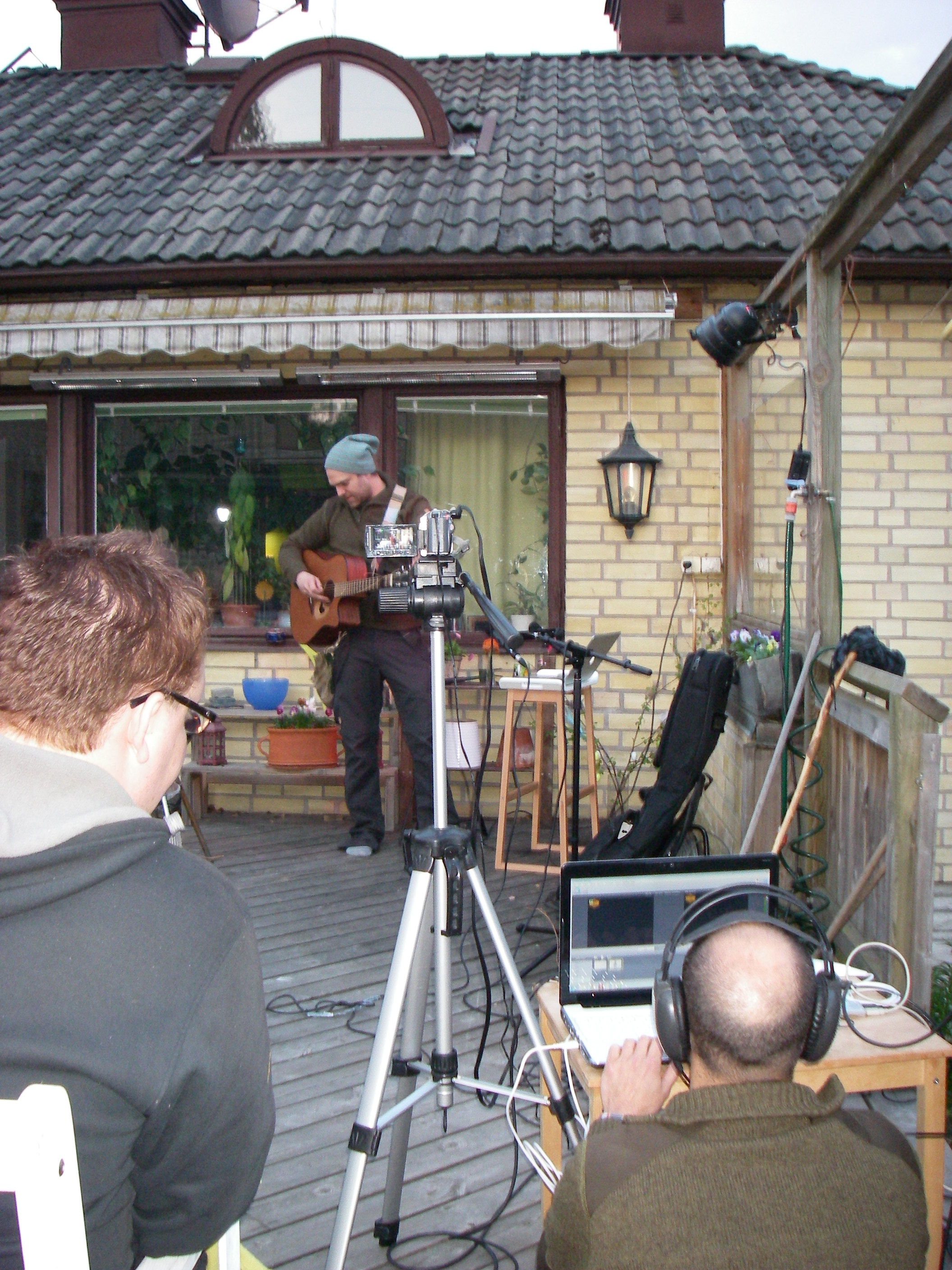 Spelning första dagen på vandringsturnén 2011. Första etappen gick mellan Södermalm och Huddinge i Stockholm. Stiko Per Larsson spelar, Michel Benoit sköter tekniken och forkarl Kurre övervakar.